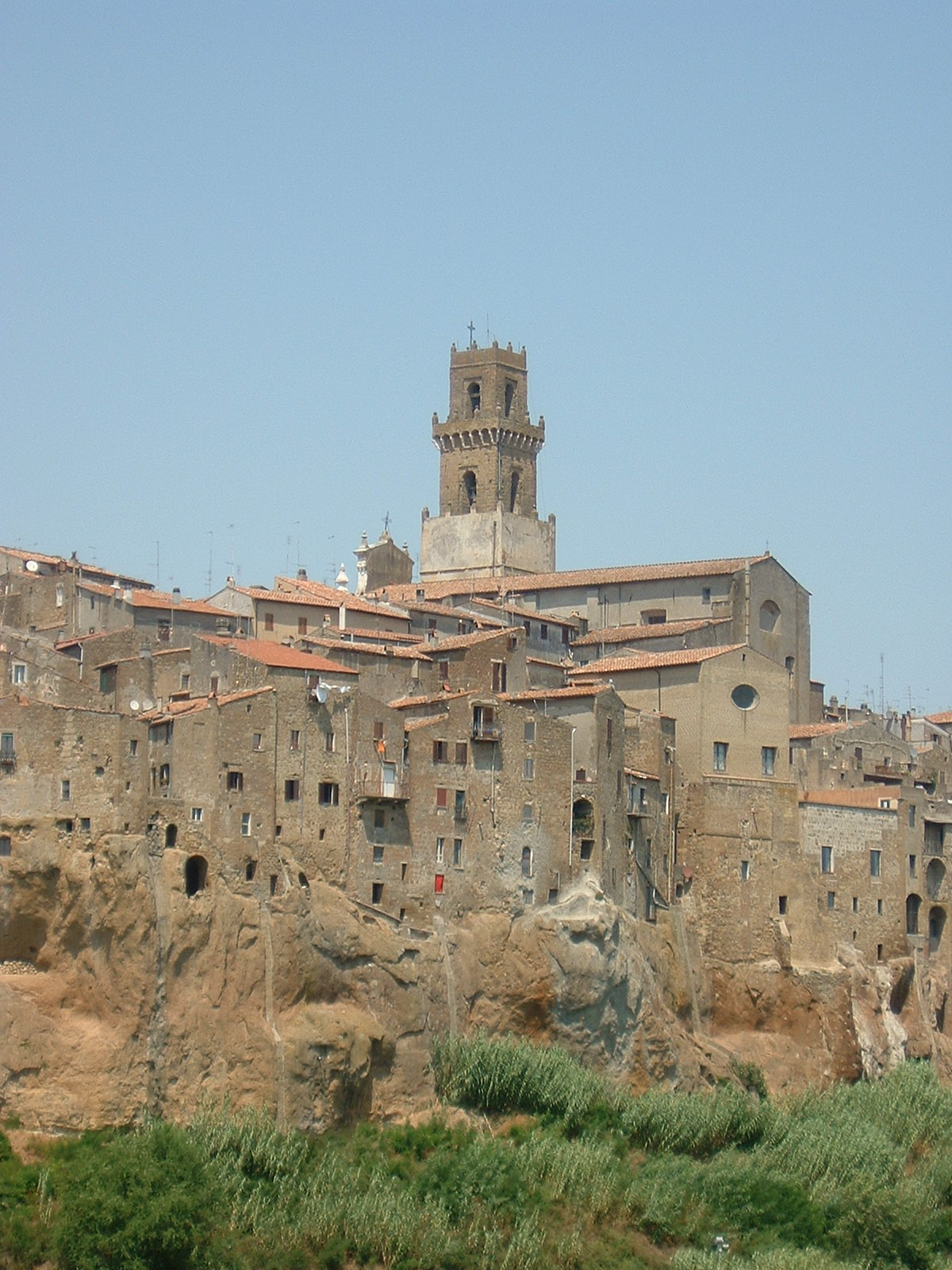 Pitigliano, Toscana, Italia